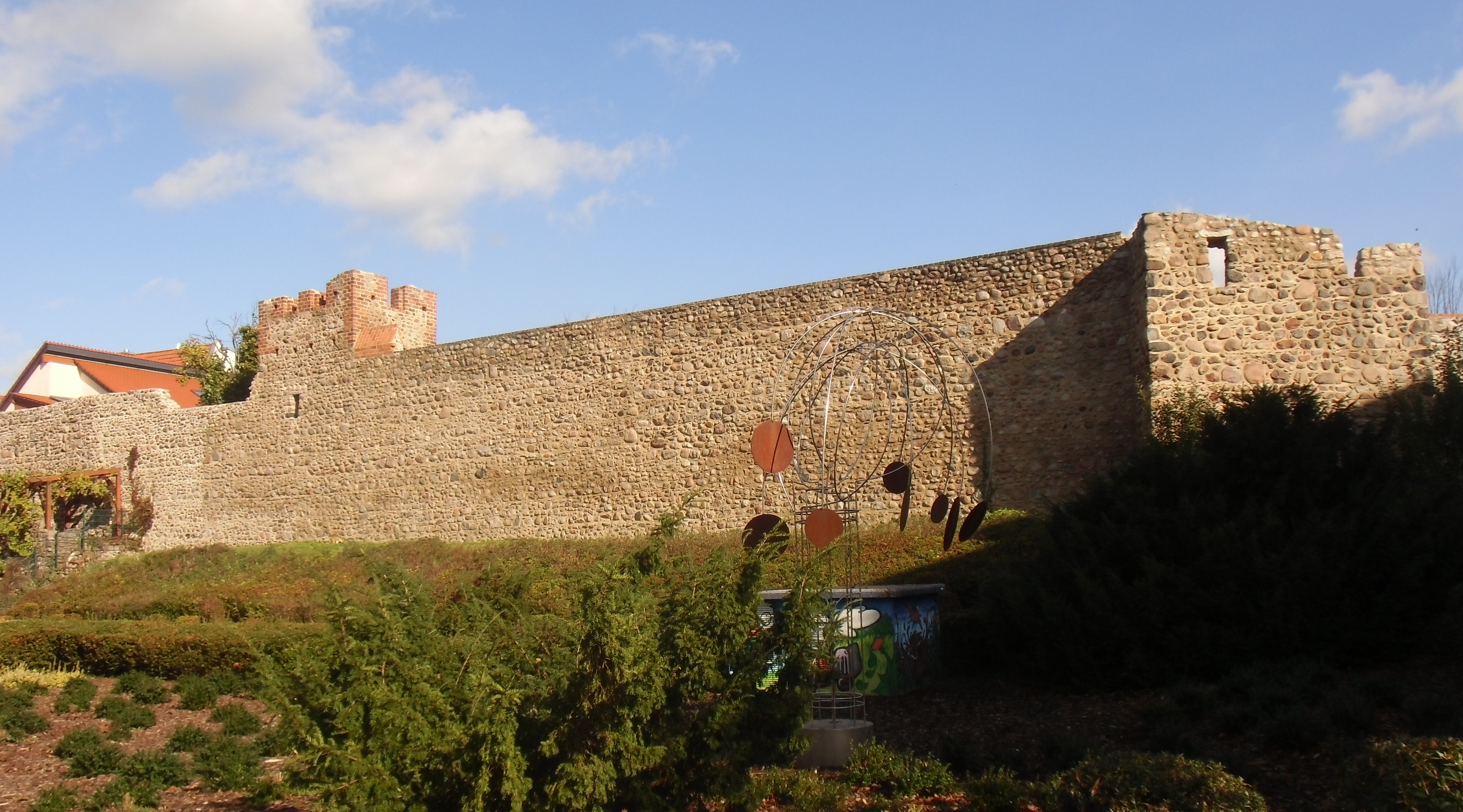 Denkmalgeschützte alte Stadtmauer aus dem 14. Jahrhundert mit Wiekhaus vom Ufer des Straussees, Nr. 5 in der Liste der Baudenkmale in Strausberg